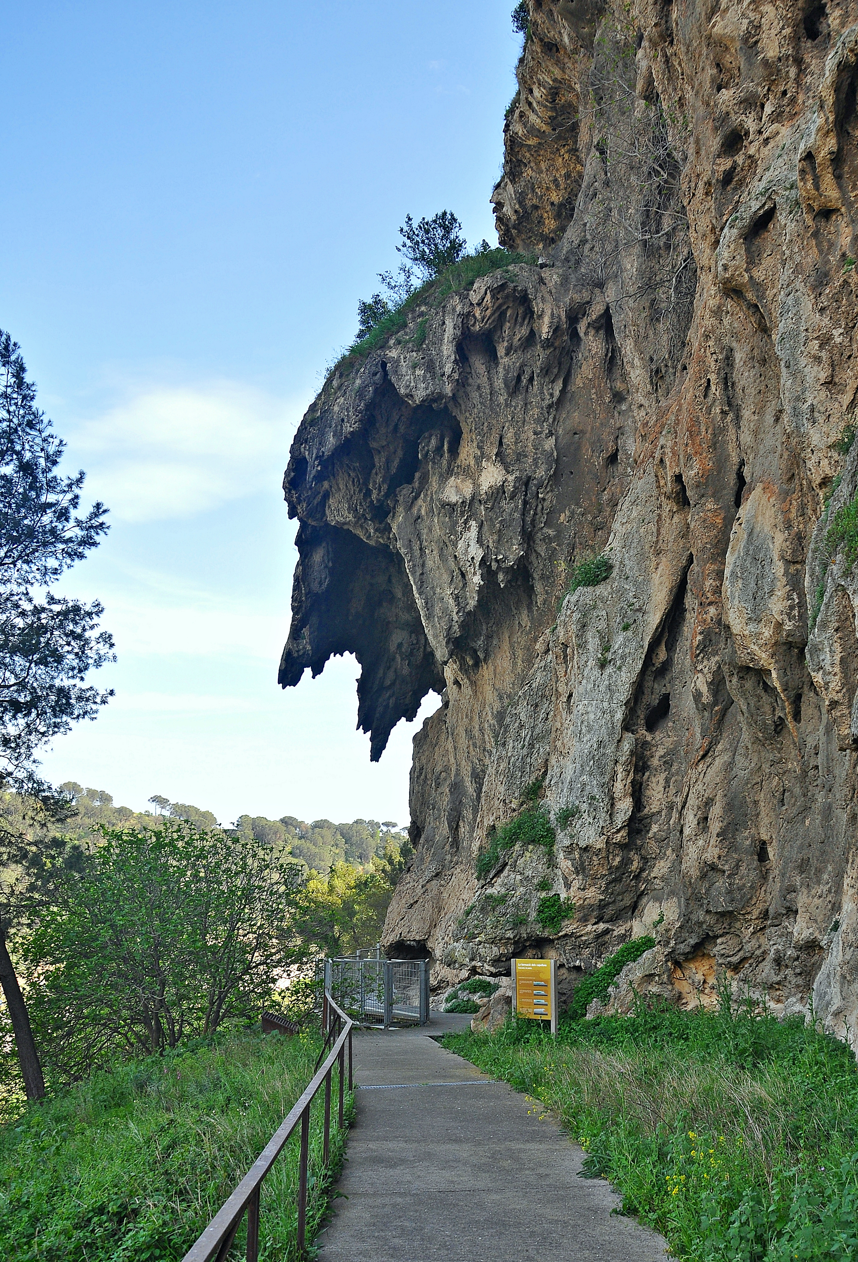 Barranco del Capello-2017